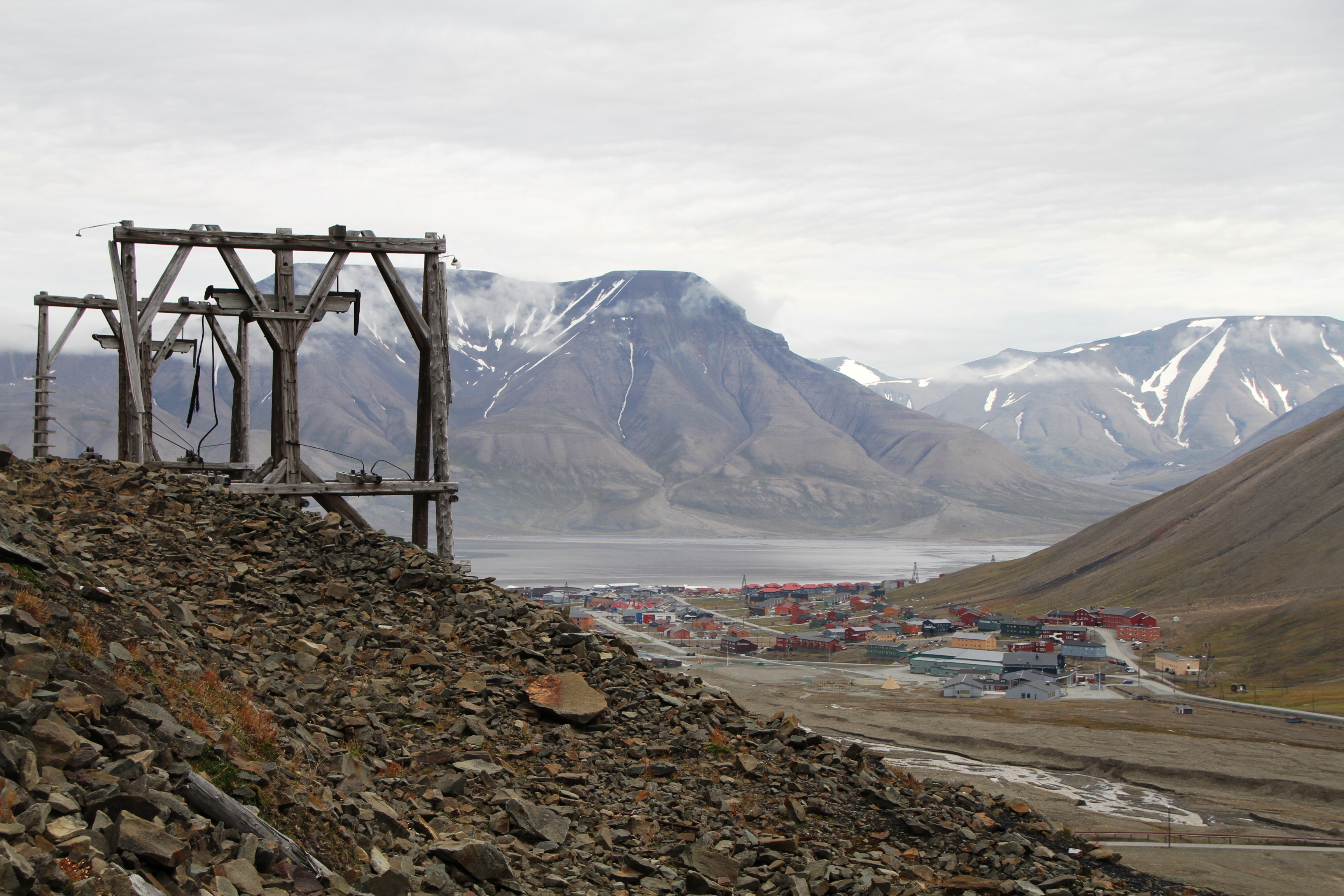 Sverdrupbyen mining community in Longyearbyen, Svalbard